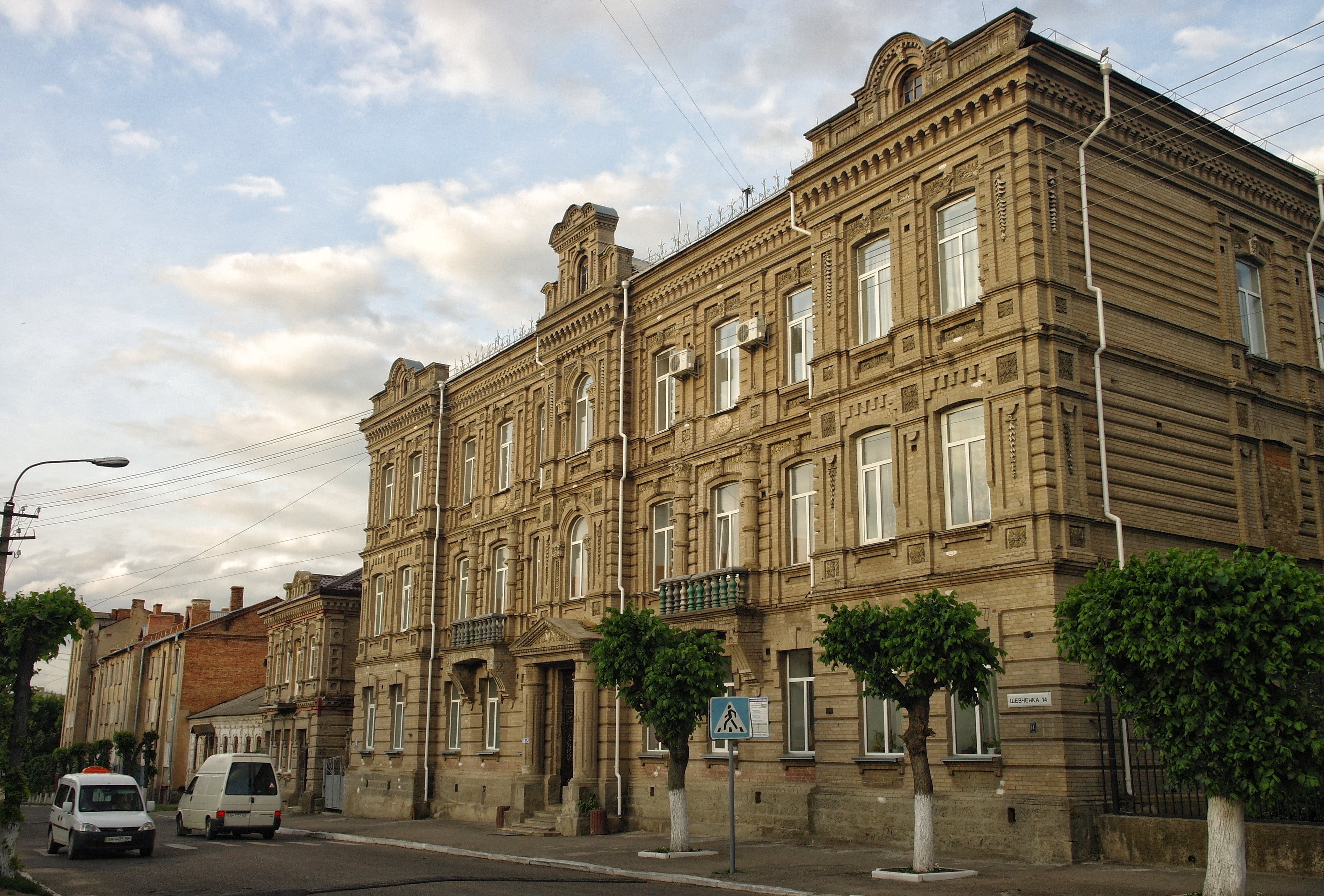 Бердичів, Шевченка, 14